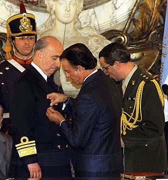 El presidente Menem puso en posesión del cargo al nuevo jefe del Estado Mayor Conjunto, vicealmirante Jorge Enrico.